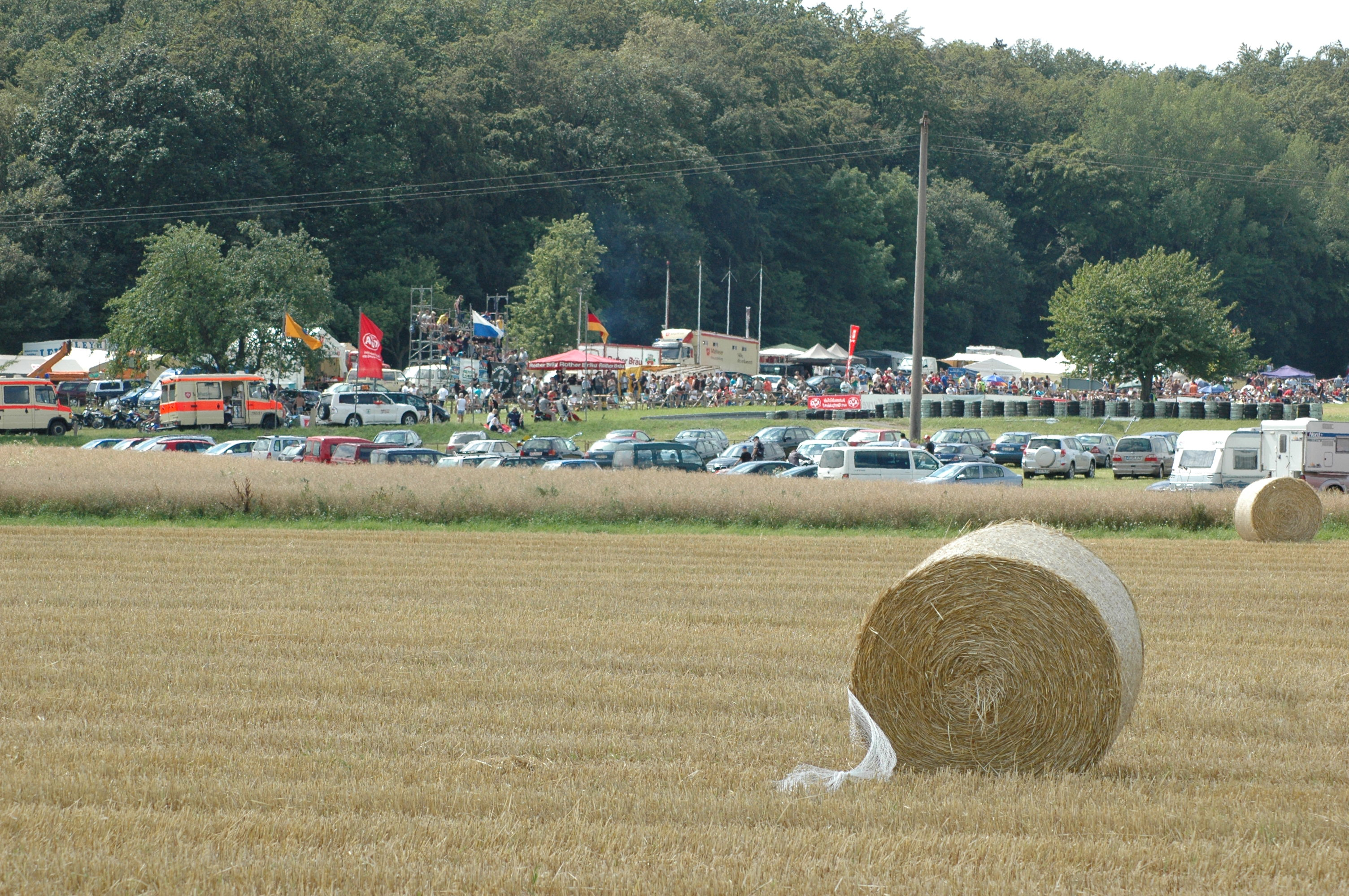 Blick von Osten auf die Joppkurve